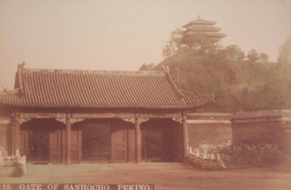 北京景山老照片。山右里门（景山西门）外侧。